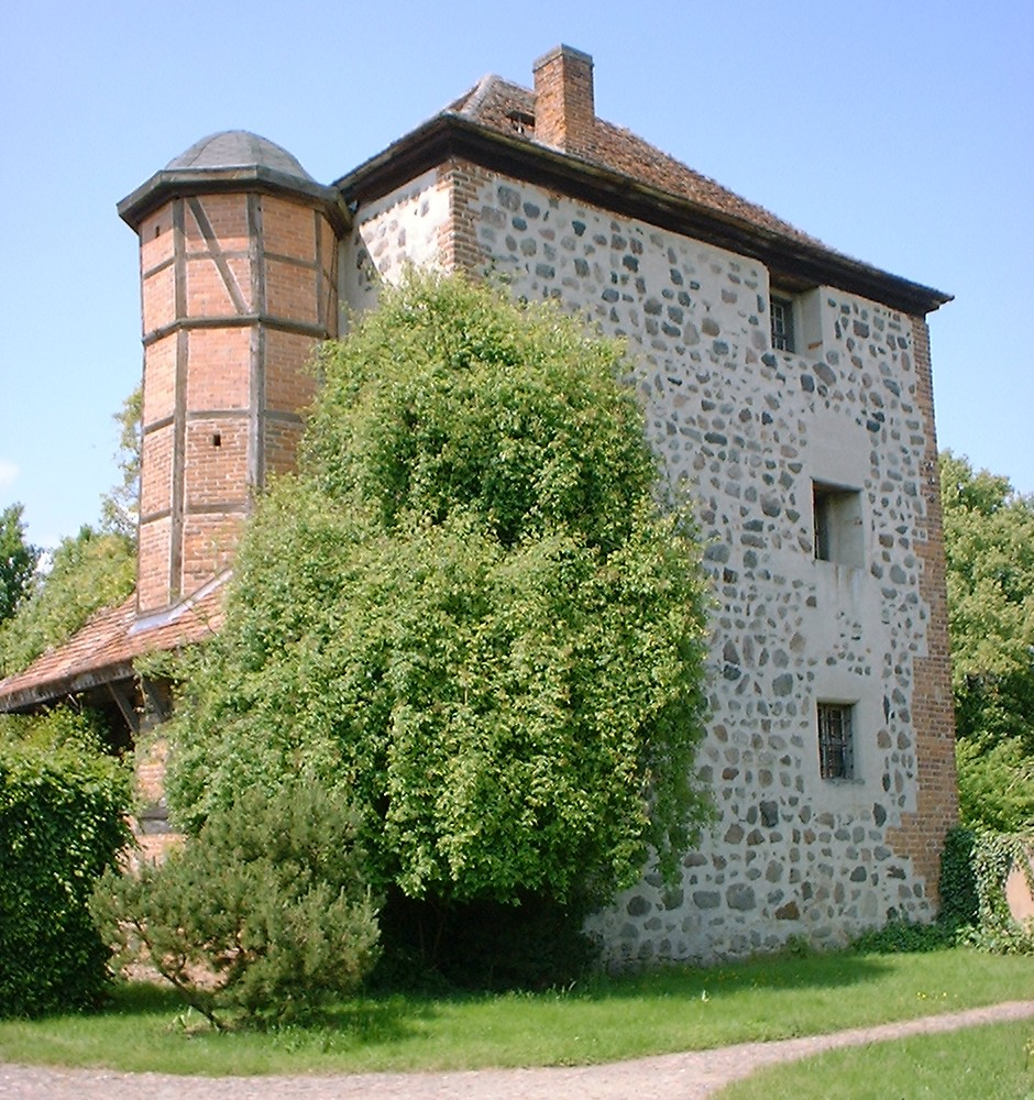 Mittelalterlicher Wohnturm derer von Quast in Temnitztal-Garz in Brandenburg, Deutschland